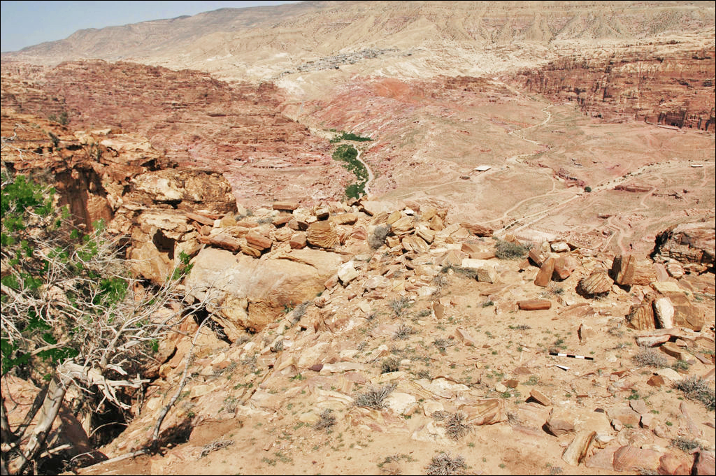 Thermes de Biyarah. Vue de Pétra depuis le djebel al Biyarah.